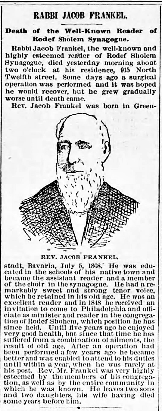 Todesanzeige des Rabbiners Jakob Fränkel (1808-1887) in der Philadelphia Times vom 13. Januar 1887